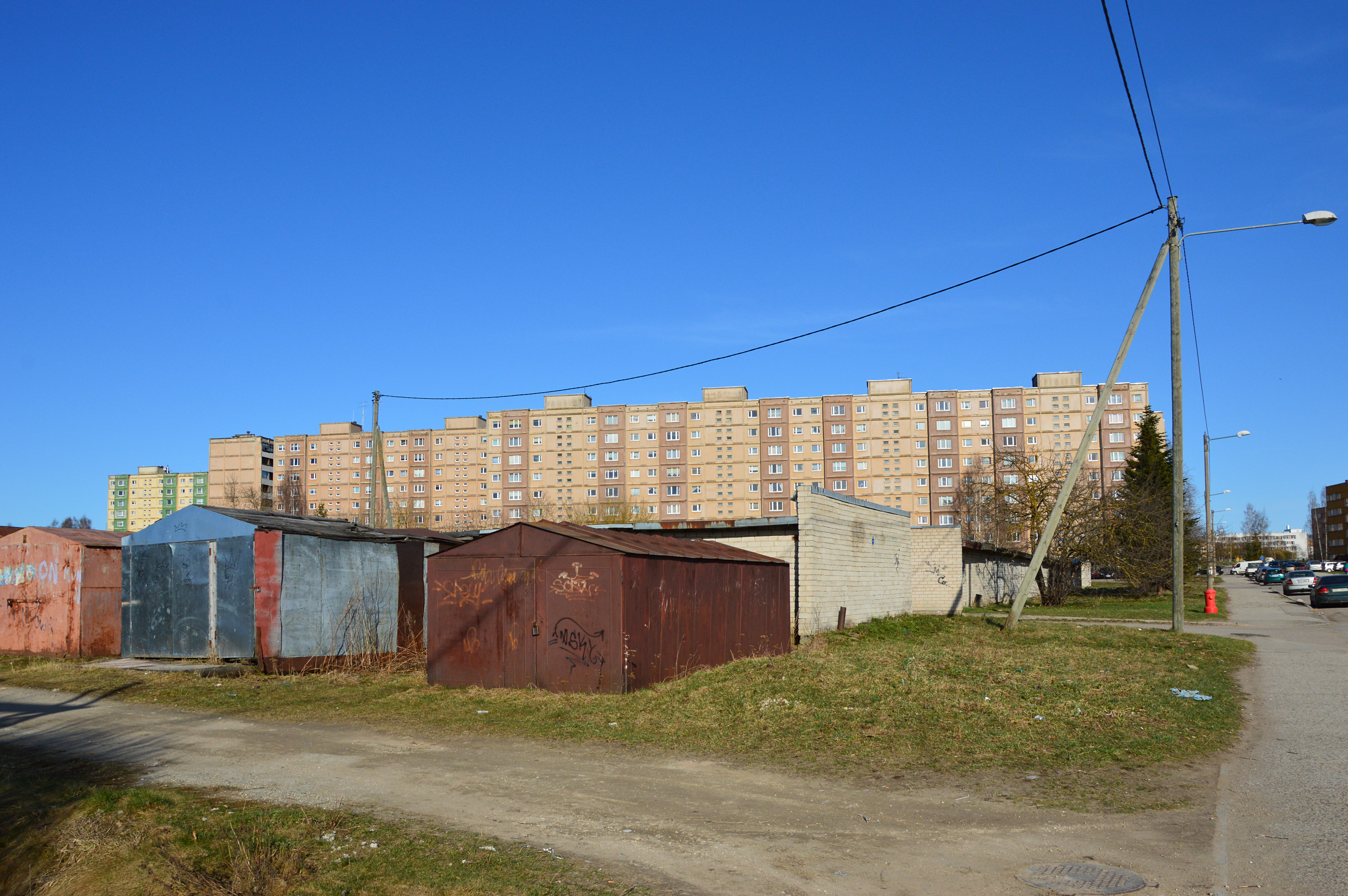 Anne tänav 80, Tartu.